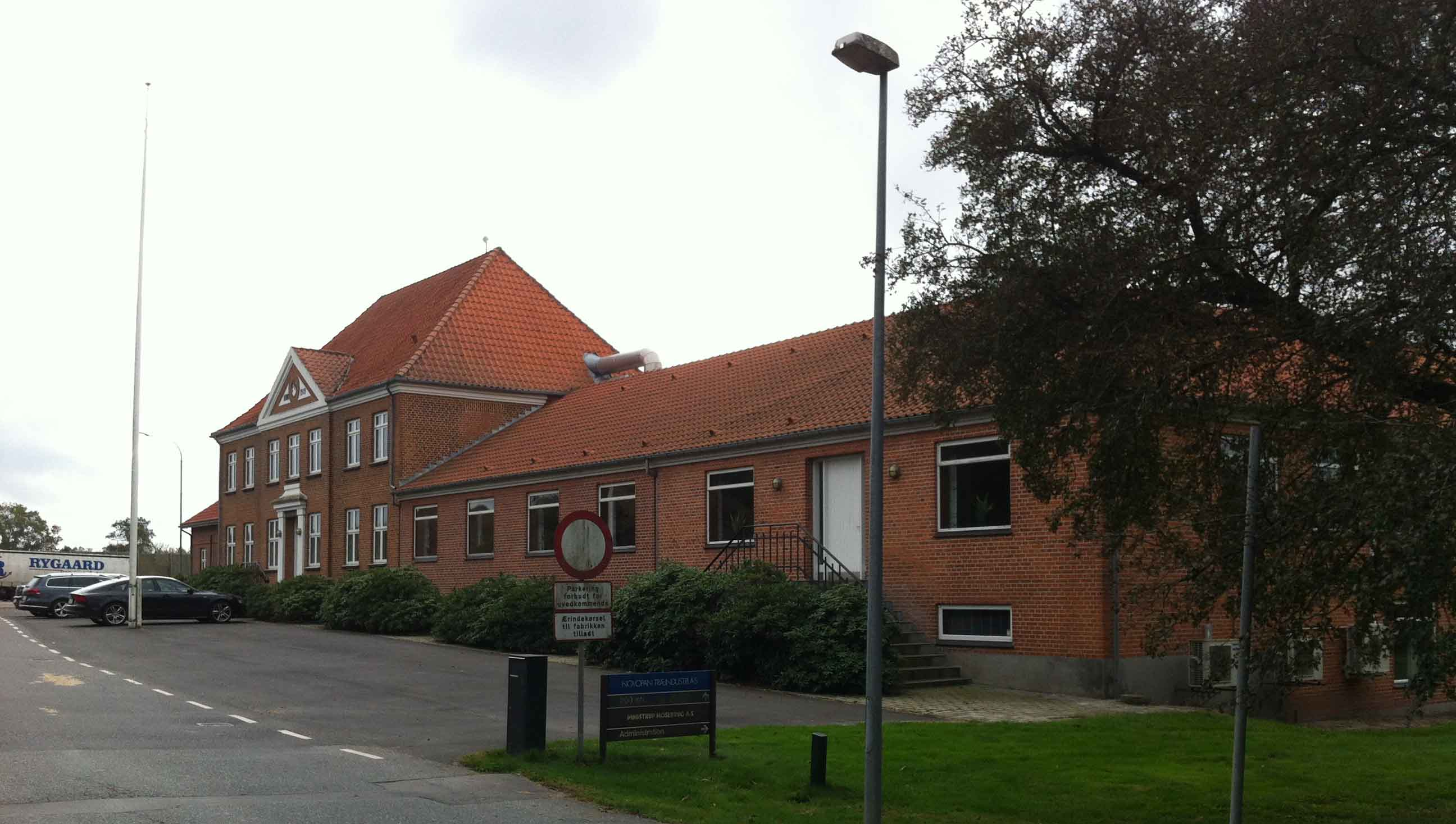 Administrationsbygningen for Pindstrup Mosebrug og Novopan Træindustri, nu Kronospan